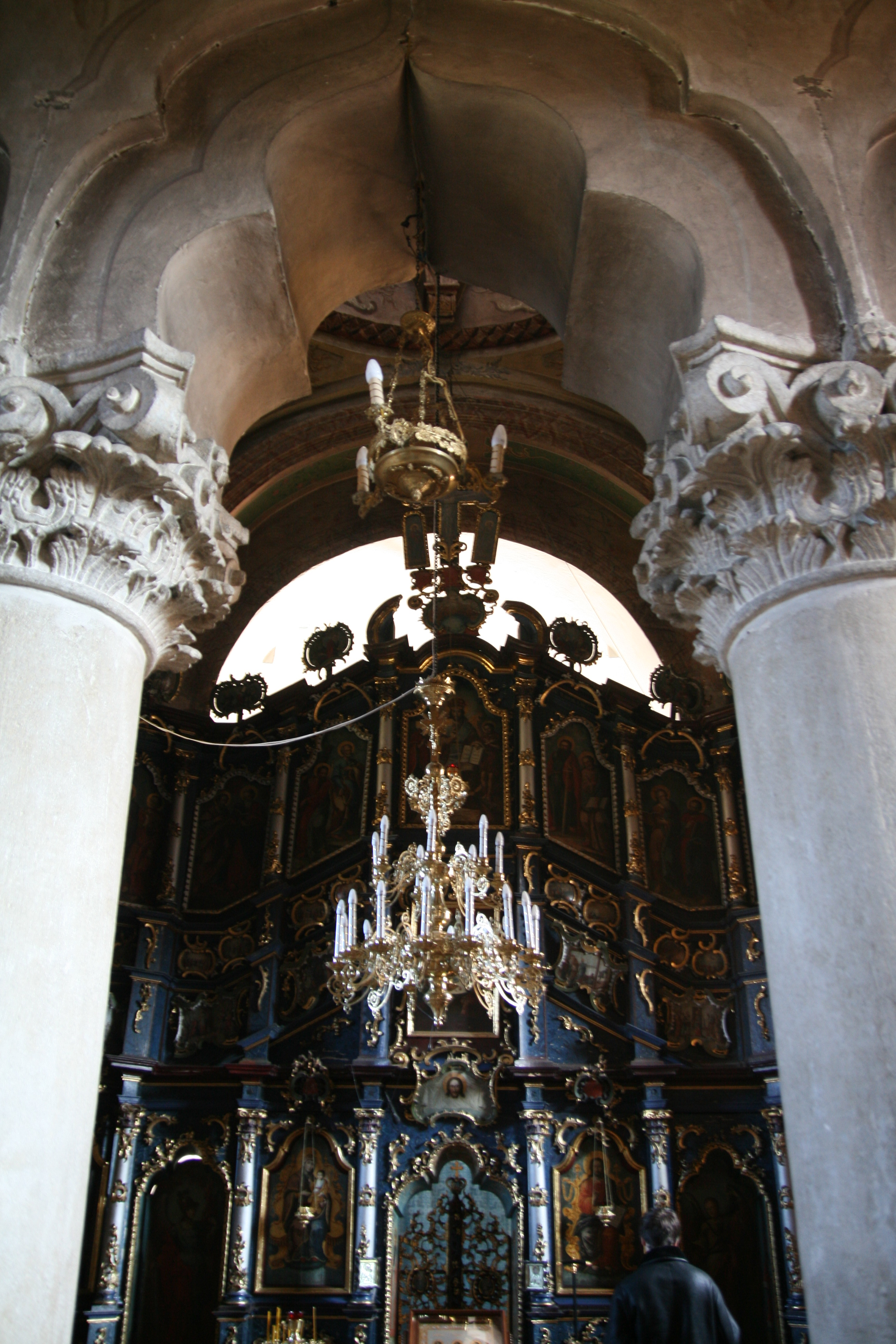 Церква Рiздва Богородицi у Горечi (мур.), Чернівці, вул. Троянiвська, 1